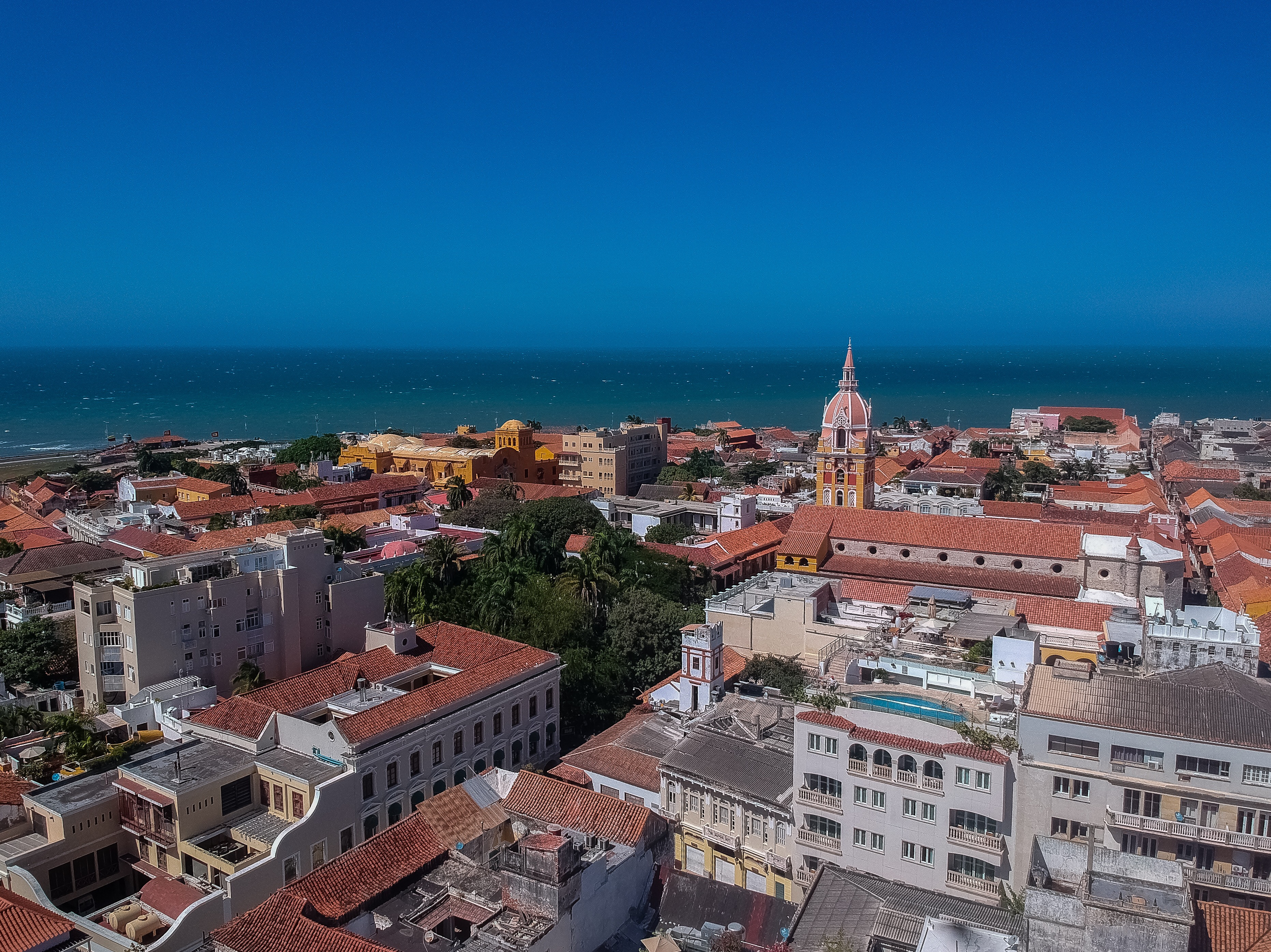 Vista aerea del noreste del centro histórico de Cartagena